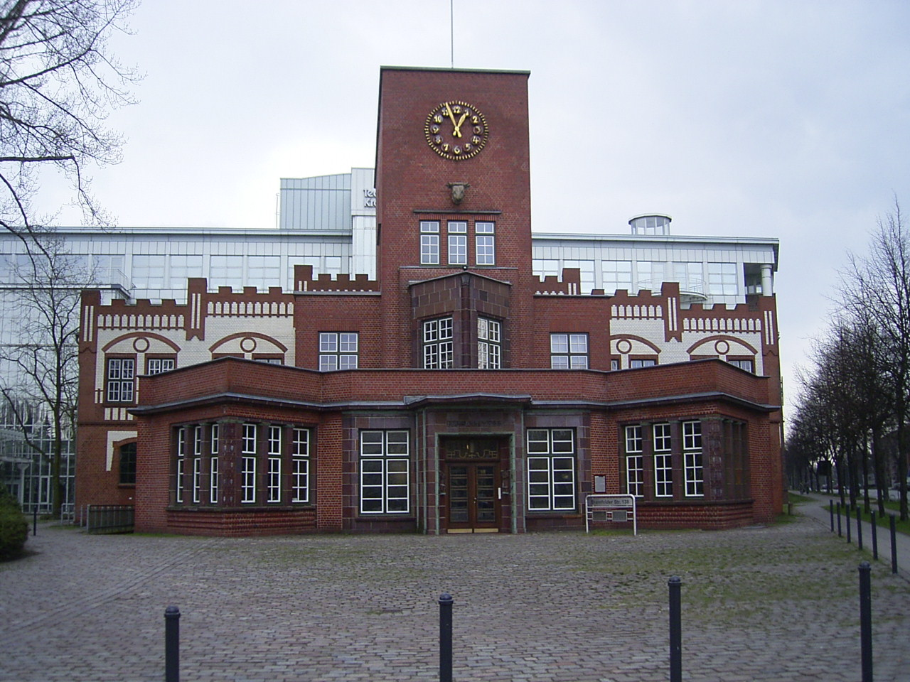 Ehemaliges Eingangsportal von Margarine Voss in Barmbek-Nord. This is a photograph of an architectural monument.